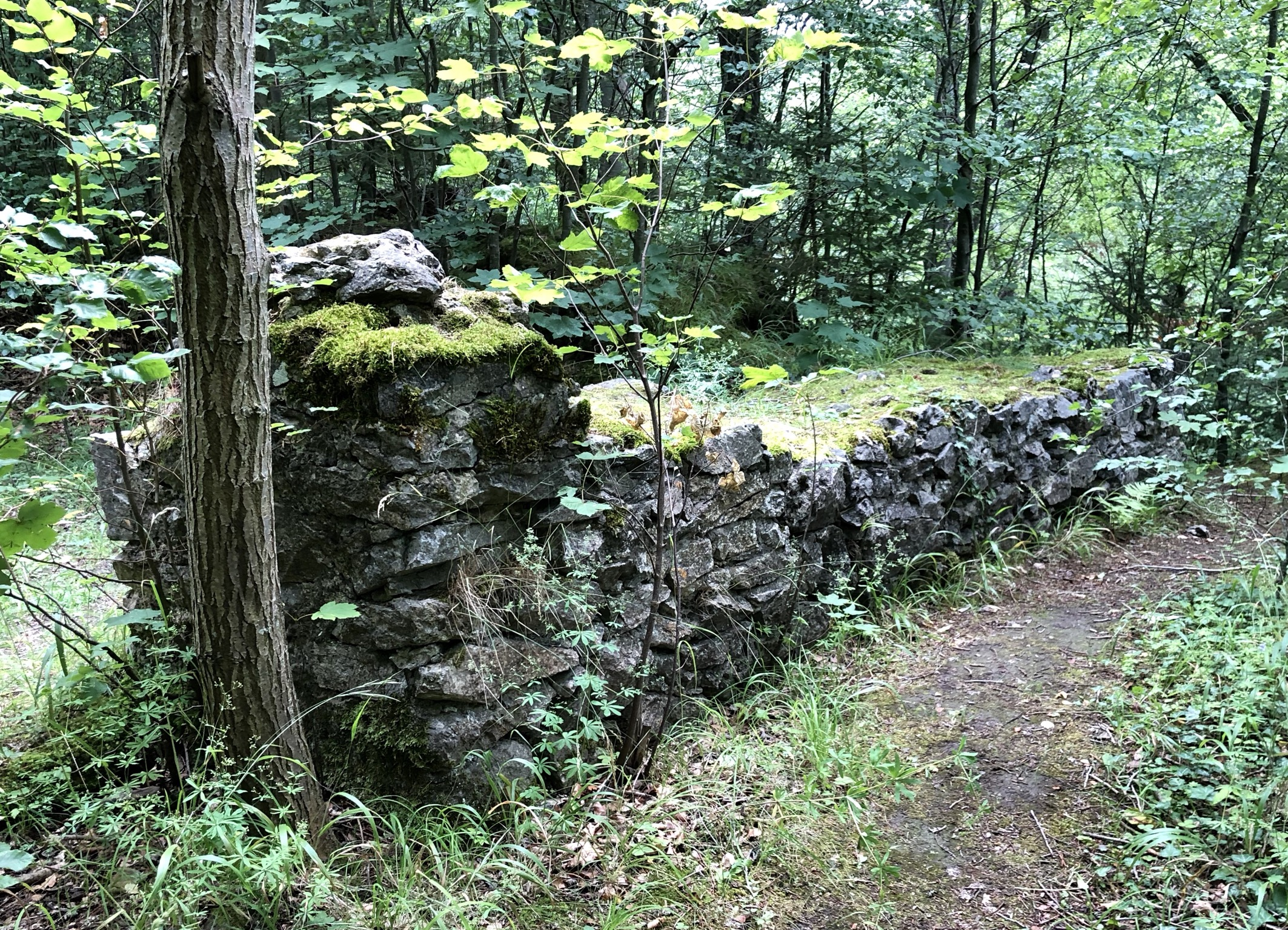 Volkmarskeller Mauerrest